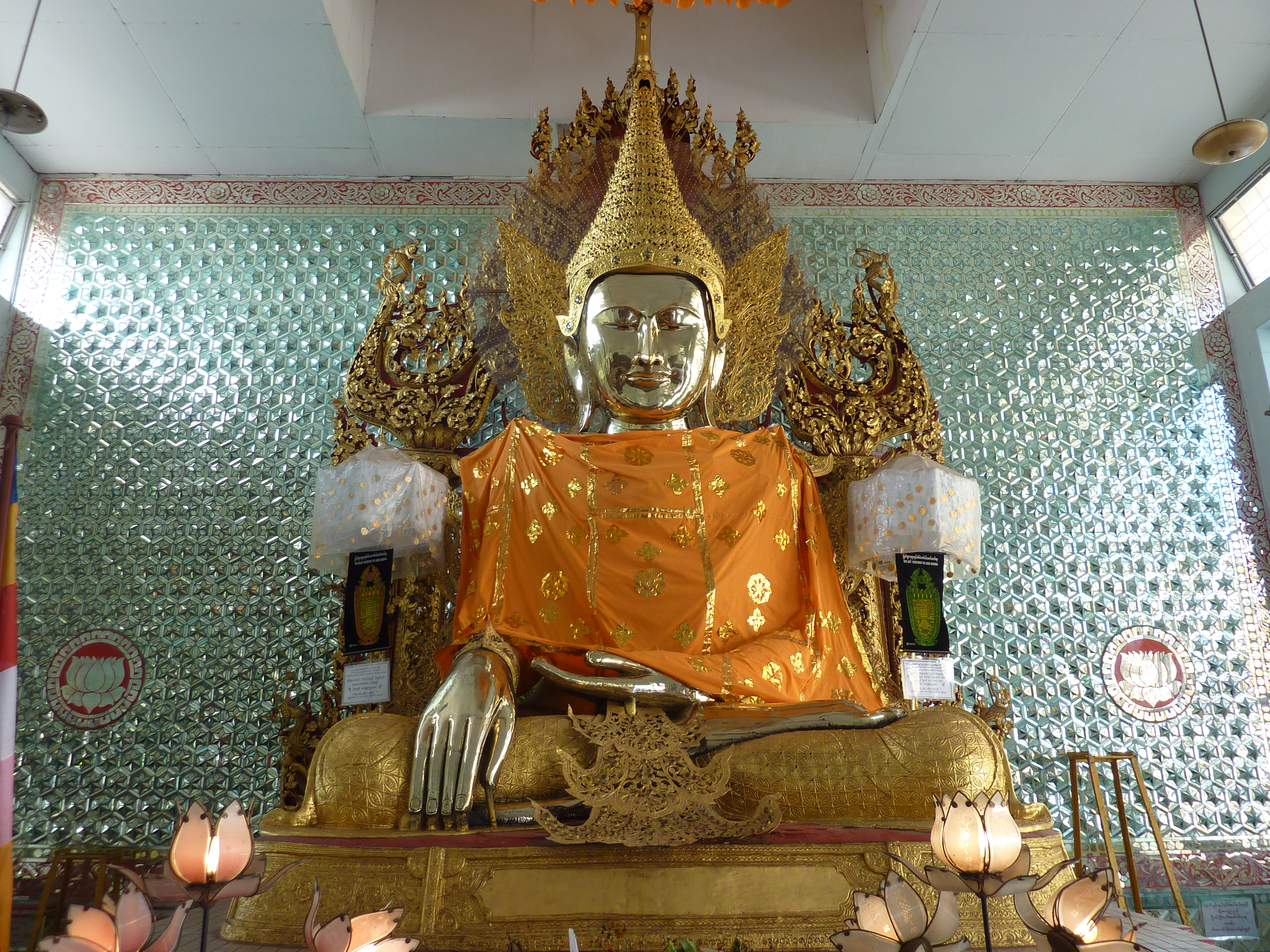 020 Kyaik-khauk, Thanlyin